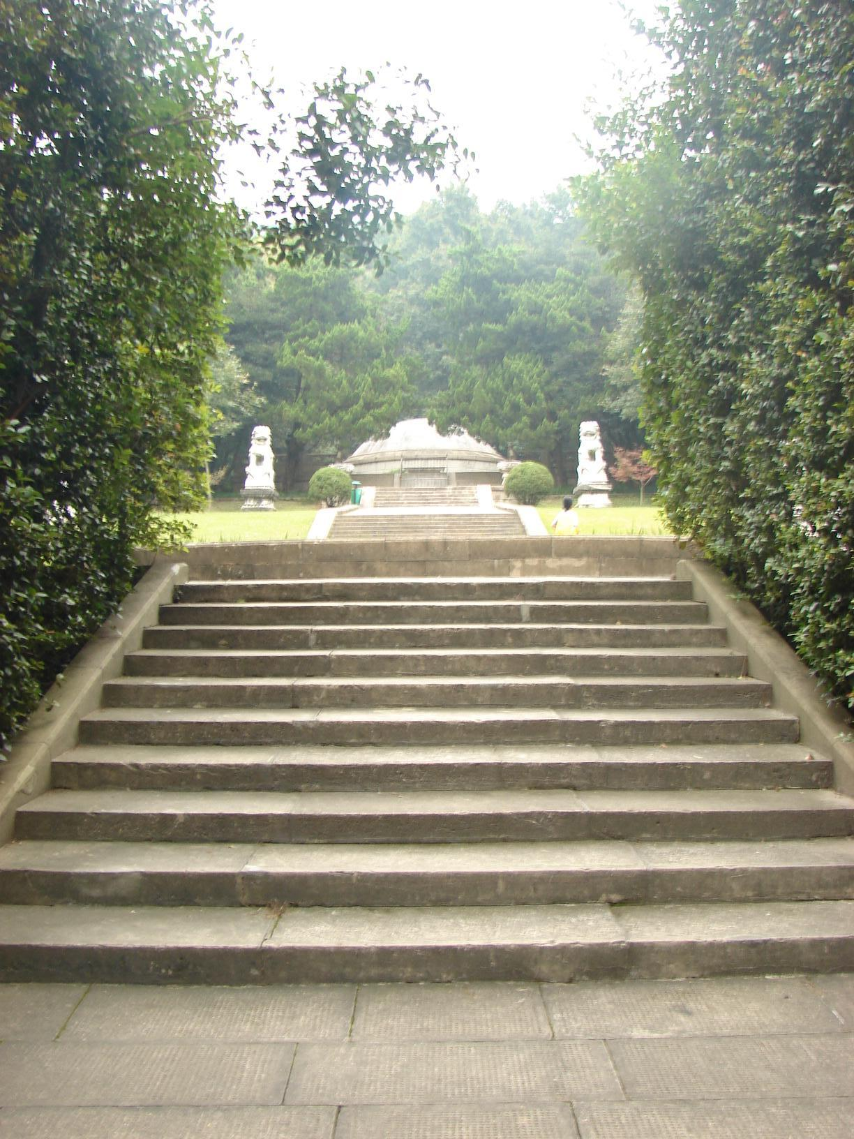 位于中山陵风景区的谭延闿墓